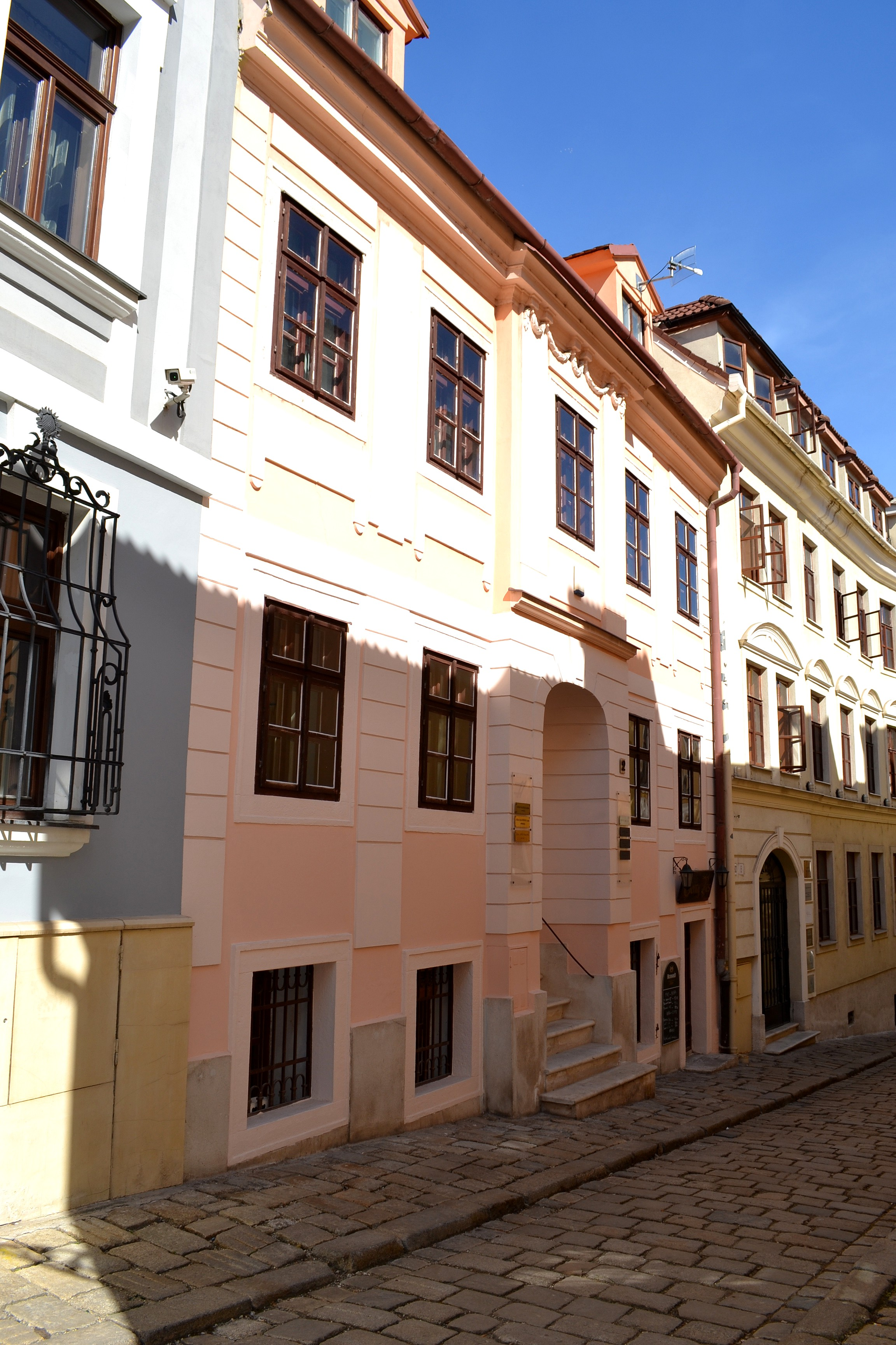 Na vŕšku č. 2. Celkový pohľad